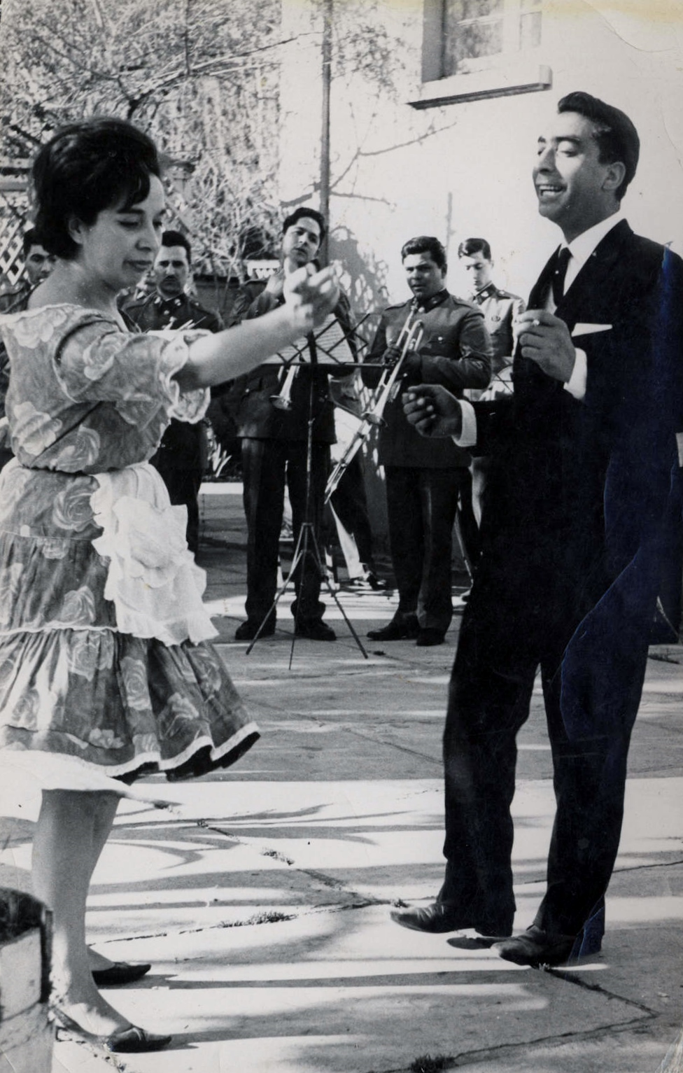 El político comunista chileno Ernesto Araneda en su época de alcalde subrogante de San Miguel